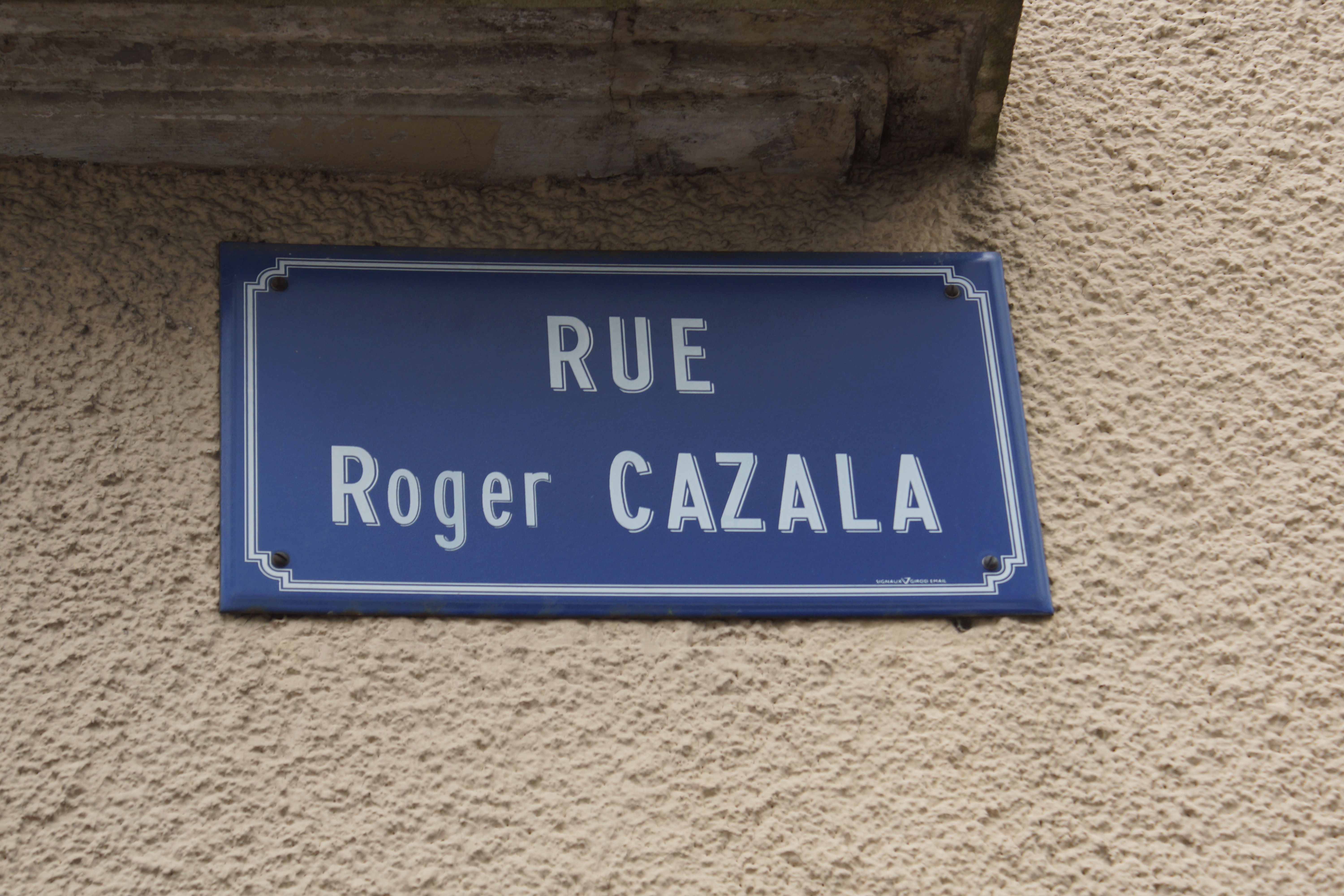 Plaque de rue Roger Cazala à Châteauroux.